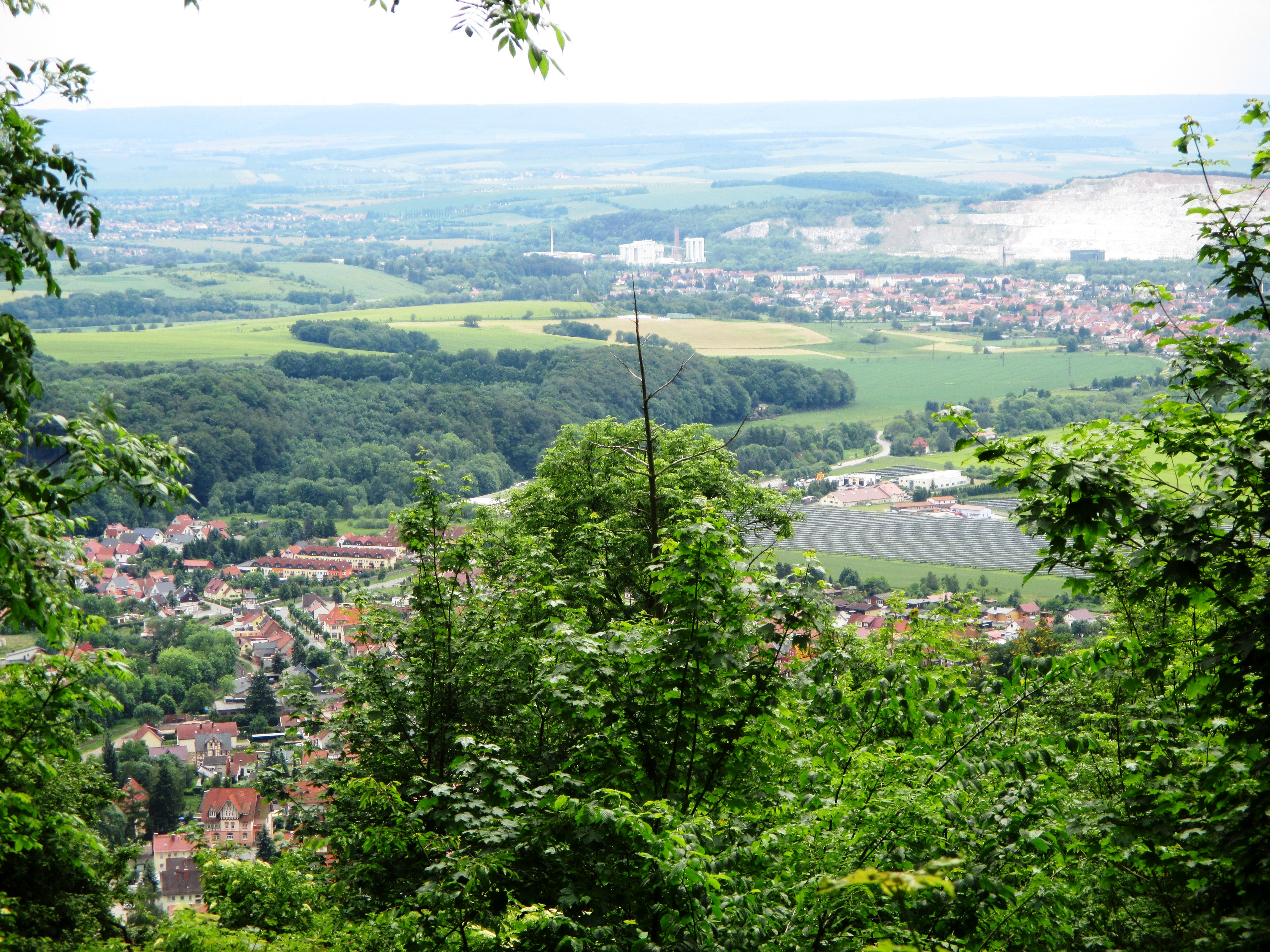 Blick auf Ilfeld im Vordergrund und Niedersachswerfen im Hintergrund von der Ilfelder Wetterfahne, Gemeinde Harztor